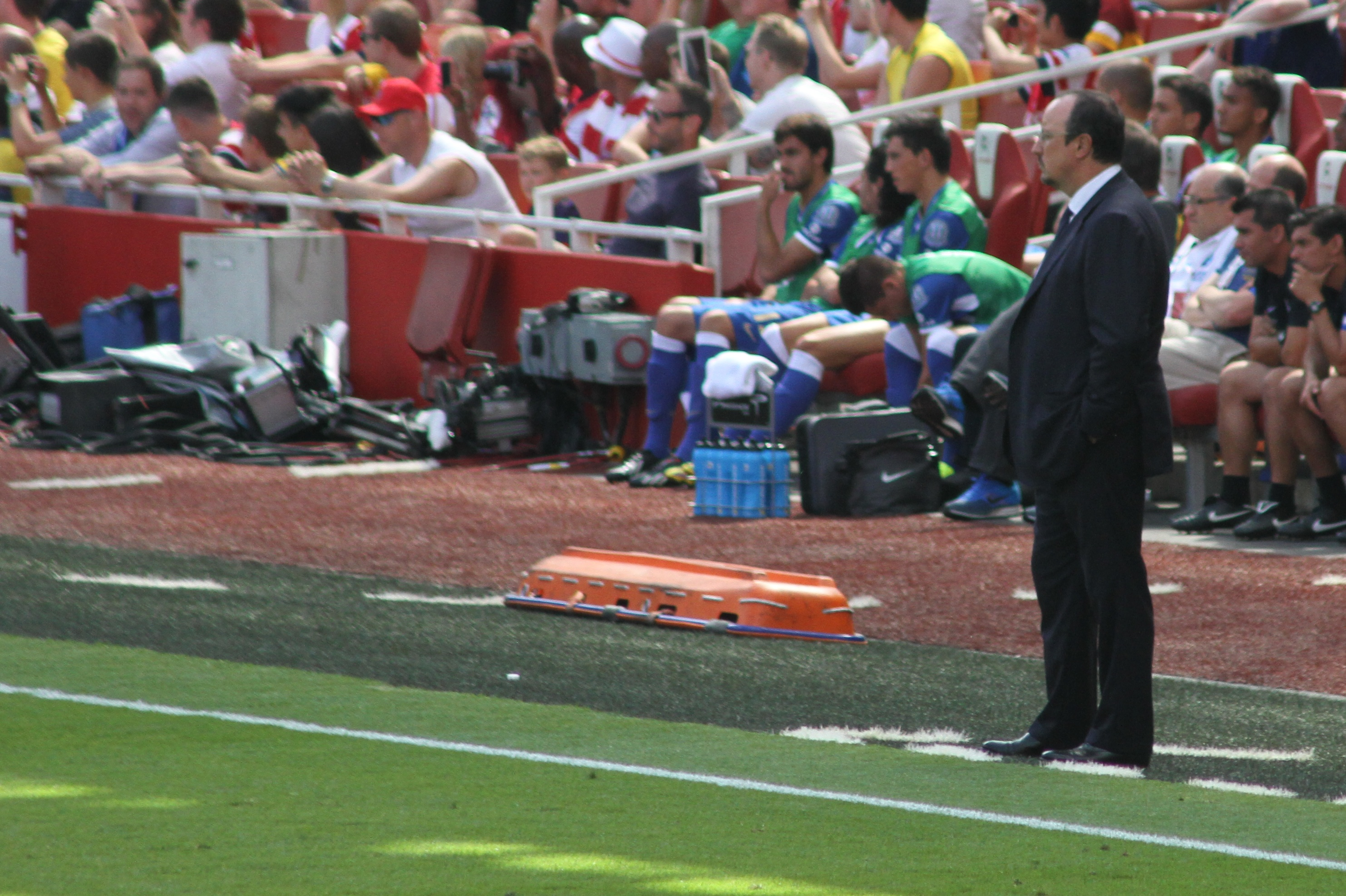 Rafa Benitez during Emirates Cup 2013